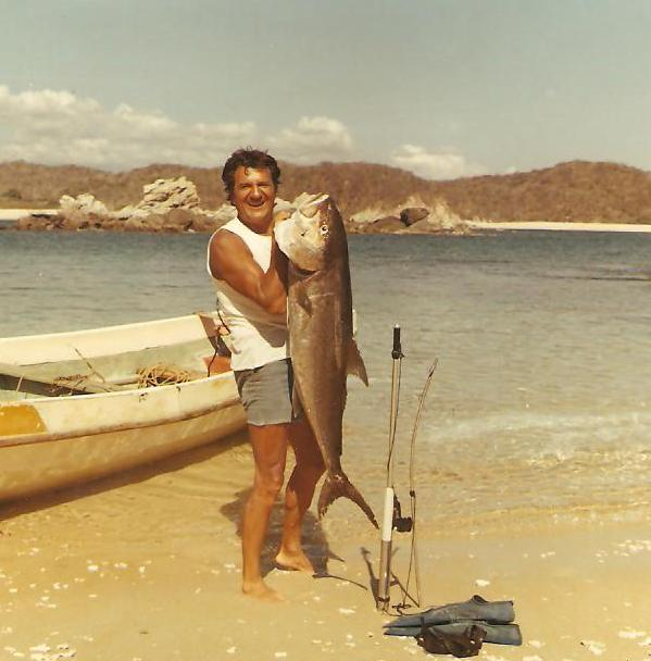 Un dia de pesca